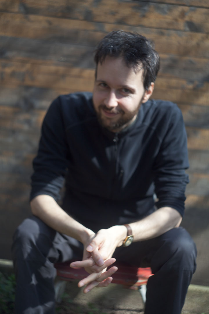 Martin Evžen Kyšperský